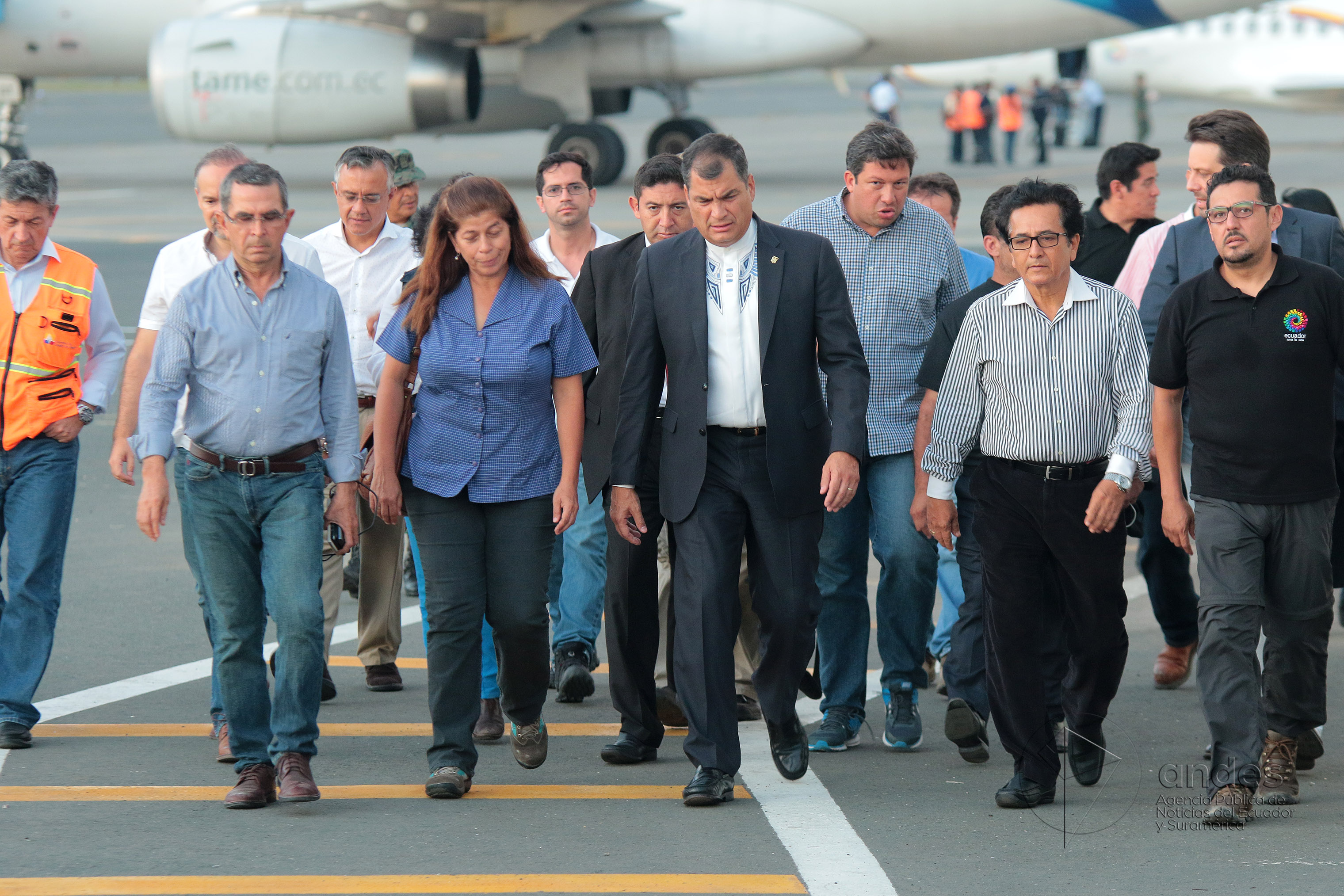 Manta, Manabí 17 Abr (Andes).- Llegada del presidente Rafael Correa a la base aérea de Manta luego de su visita al Vaticano. Fotografías: Carlos Rodríguez/Andes.